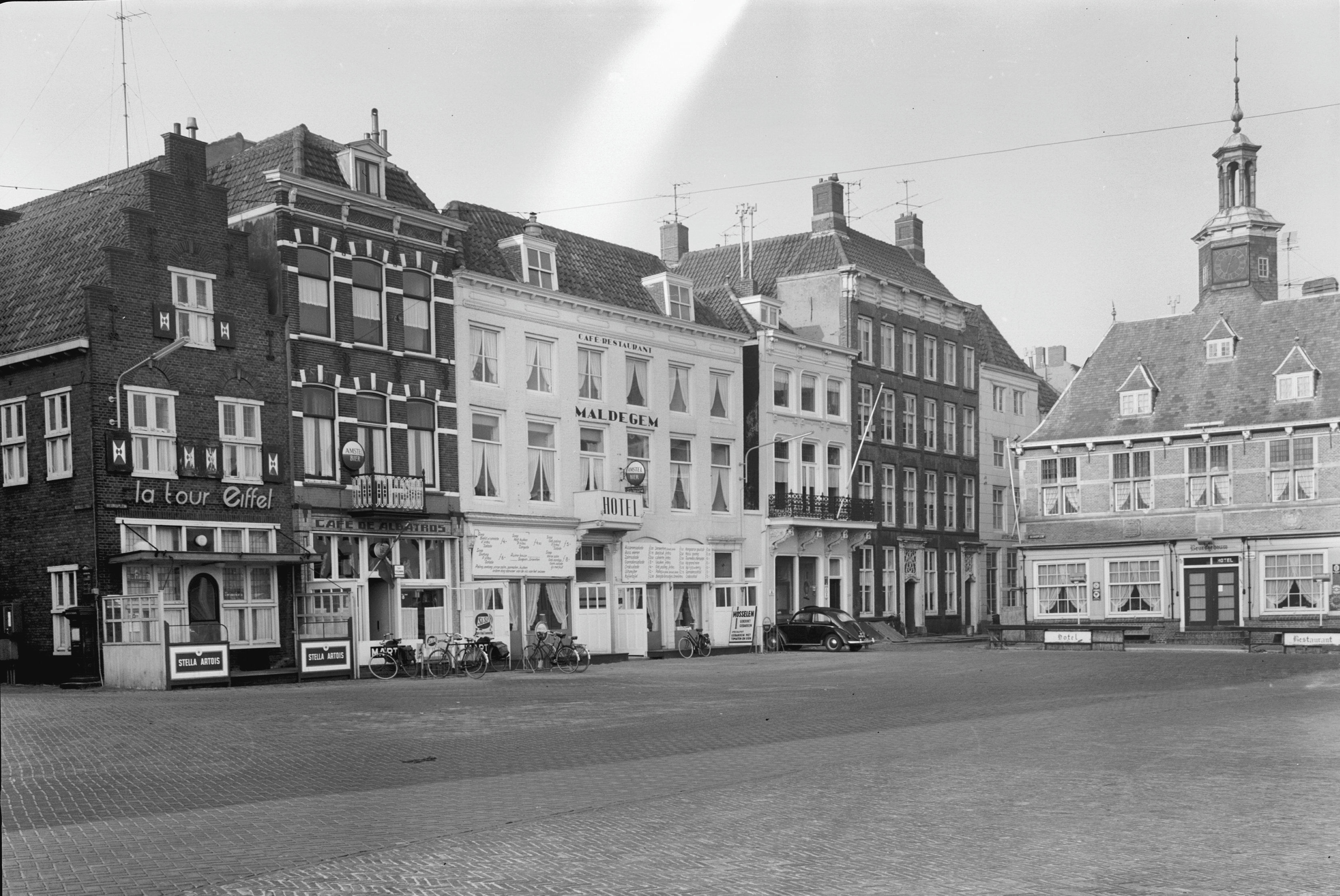 overzicht